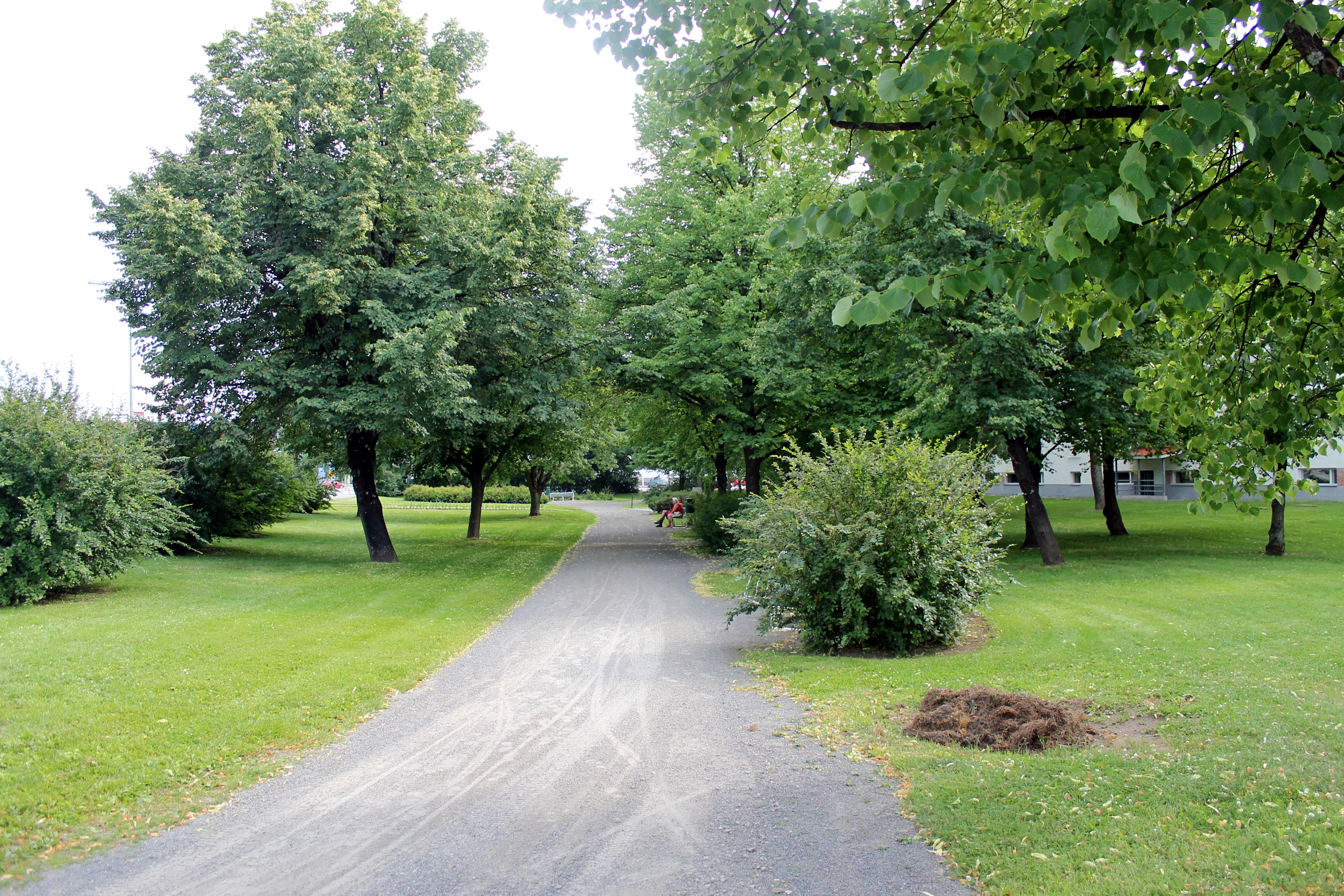 Puisto Koulukadun vieressä kesäkuussa 2013